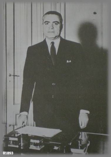 Retrato del gobernador de Tucumán, Miguel Critto. (1939-1943).